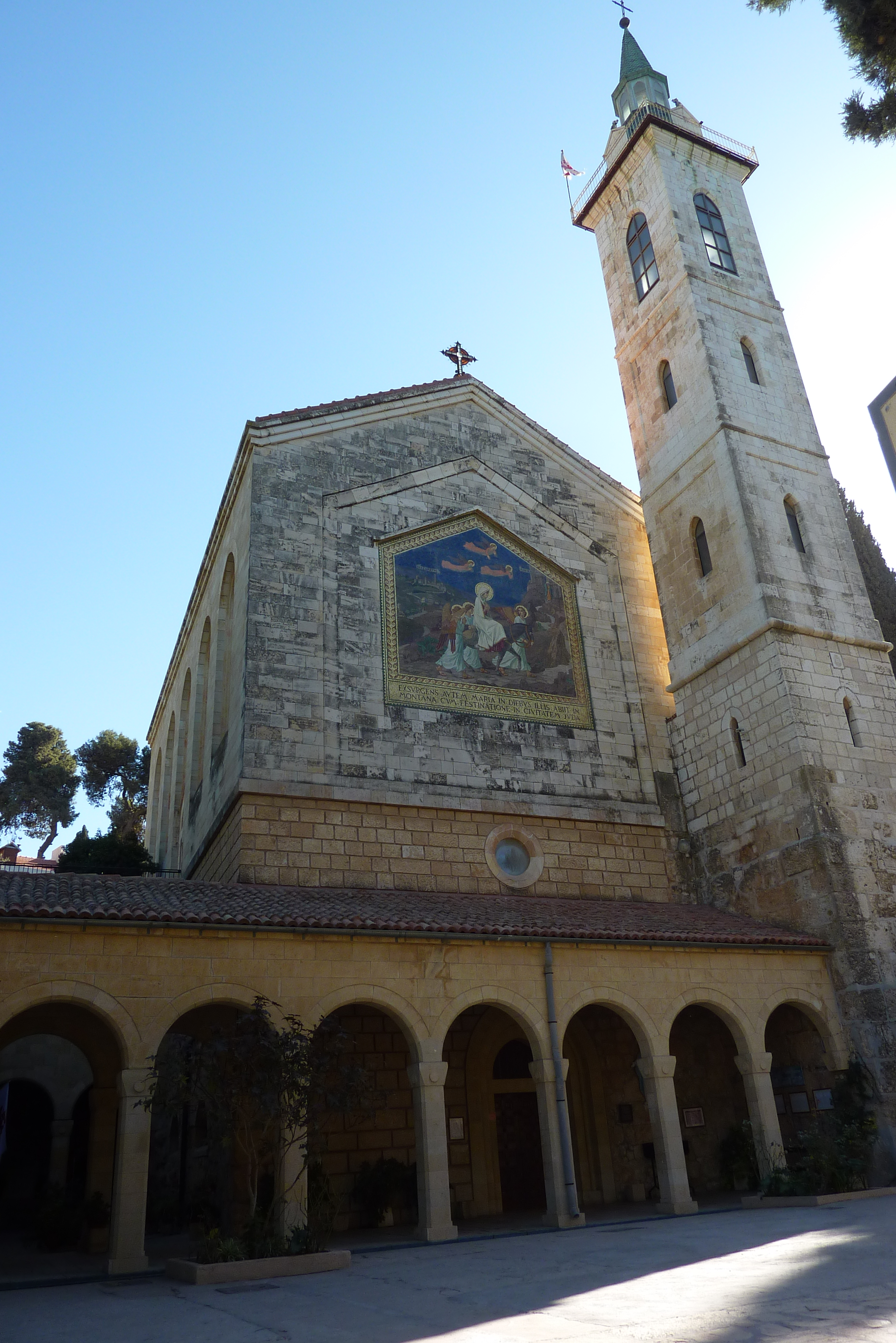 P1220803 Jerusalem